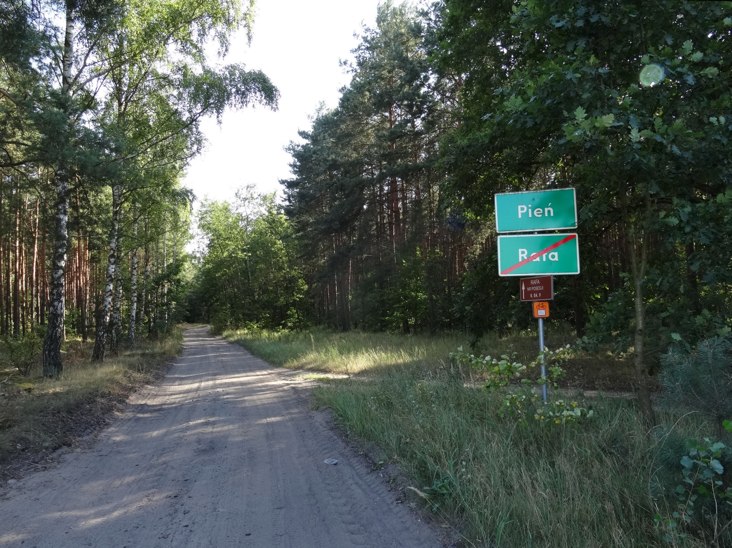 Pień, gmina Dąbrowa Chełmińska